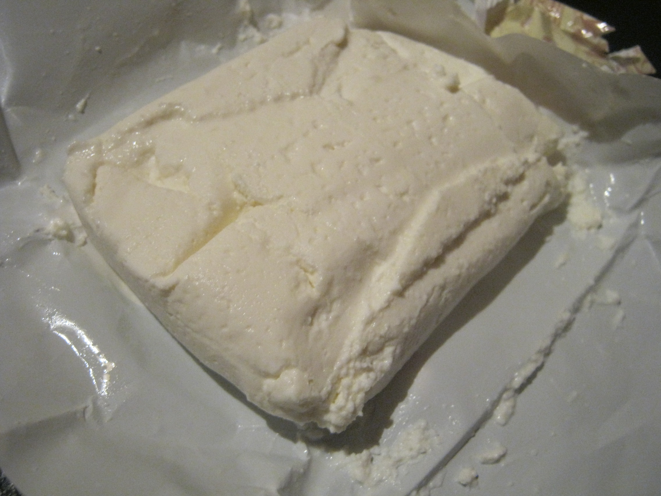 Varškė